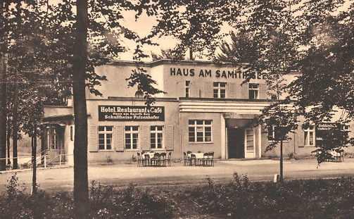 Postkarte 1935 mit Ansicht vom heute nicht mehr vorhandenen 'Haus am Samithsee' (Kurhaus, Restaurant und Hotel) erbaut 1928, im Krieg zerstört und nach dem Krieg abgerissen.